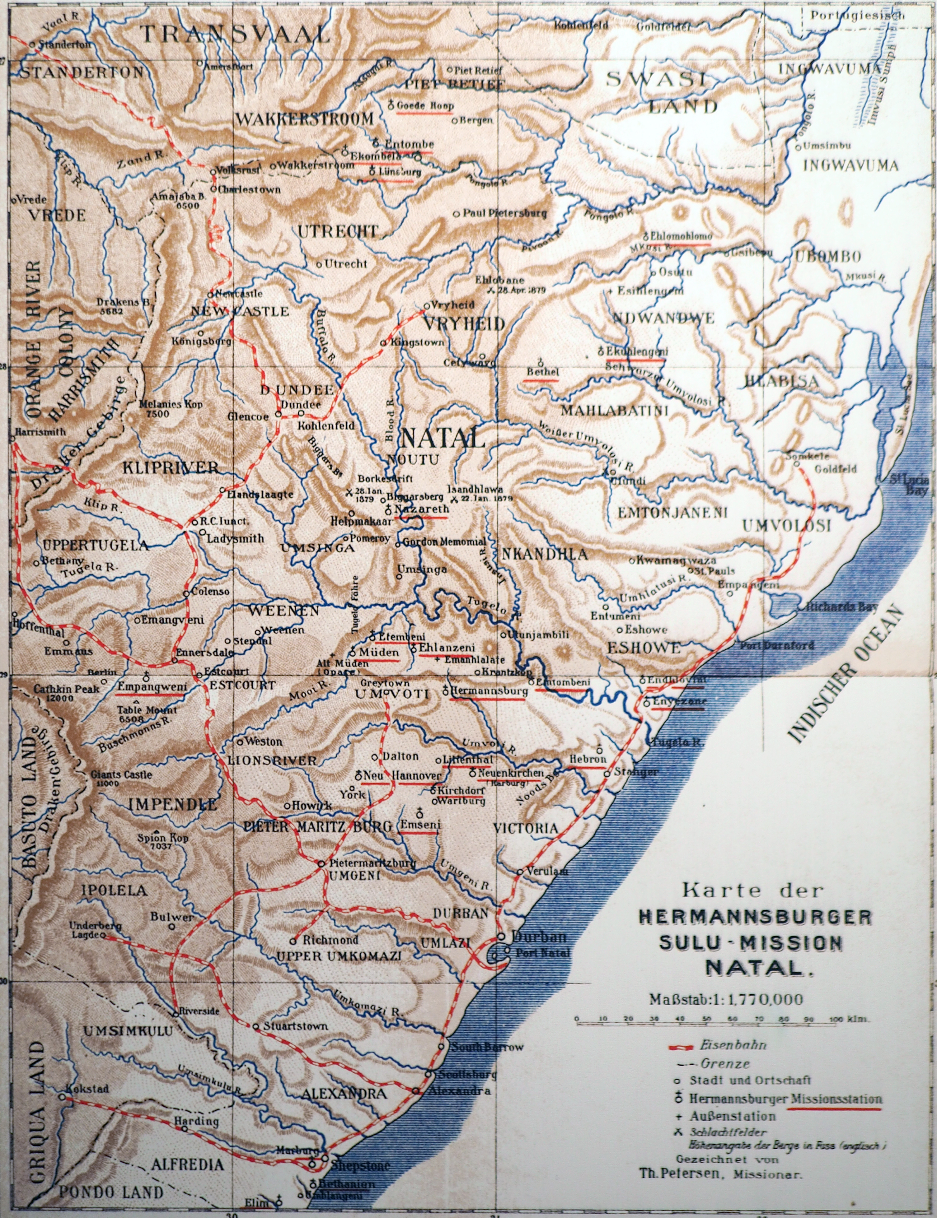 Natal, das an der Ostküste Südafrikas liegt, gehört 1910 zum britischen Kolonialreich. Mehr als 50 Jahre sind die Missionare aus Hermannsburg dort vor Ort und haben zahlreiche Niederlassungen gegründet. Aus diesem Grund tragen viele Orte hier die gleichen Namen wie Gemeinden und Städte in Niedersachsen.